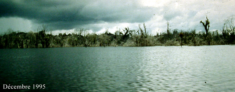 Photos prises sur le fleuve Sinnamary ou ses berges lors de la fin de la montée des eaux induites par le barrage EDF de Petit saut, en Guyane, en décembre 1995. De très nombreux arbres dont le système racinaire n'est normalement pas immergé sont morts noyés.